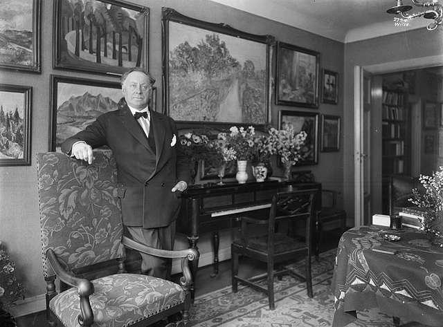 Norwegian actor David Knudsen.